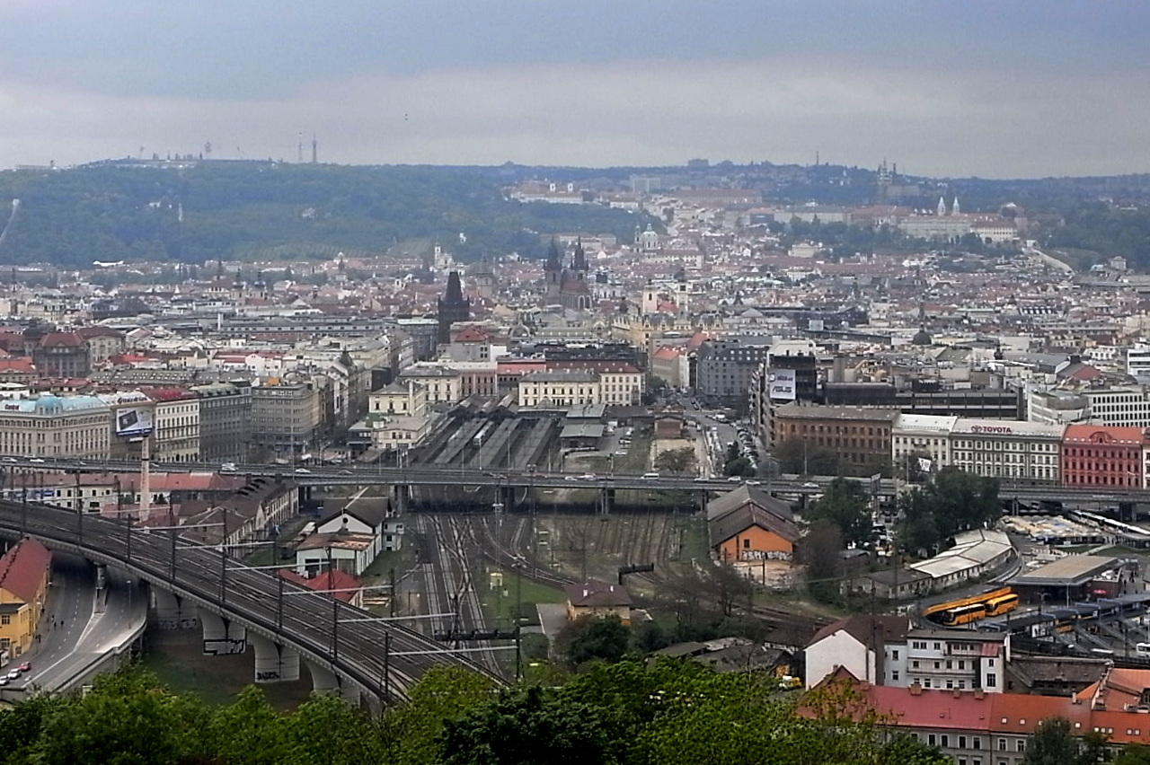 Prag, Blick vom Nationalmuseum nach Osten